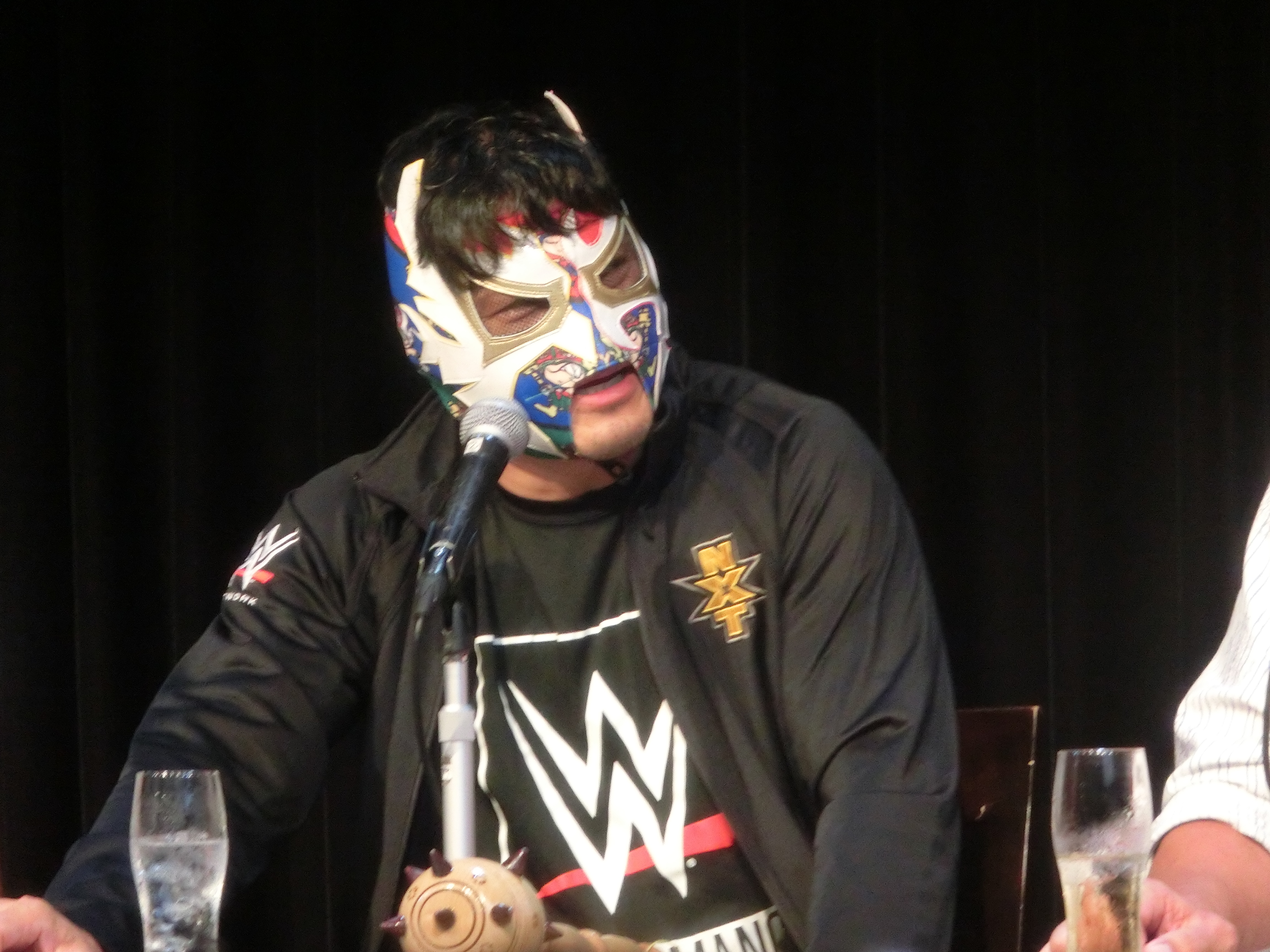 SHIBUYA LOFT9 （2019年7月13日）